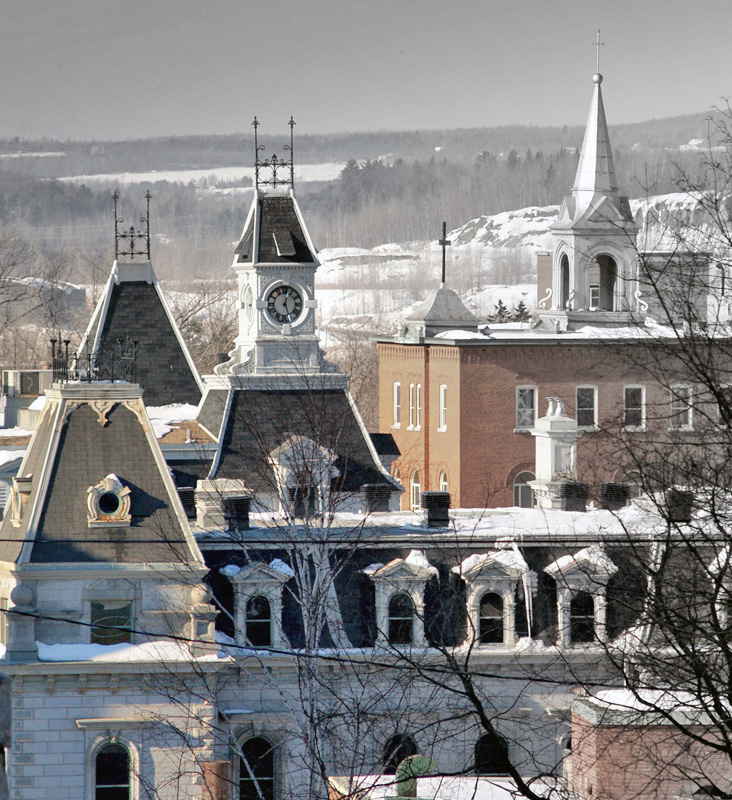 Édifices historiques sur la rue Dufferin, Sherbrooke, Québec